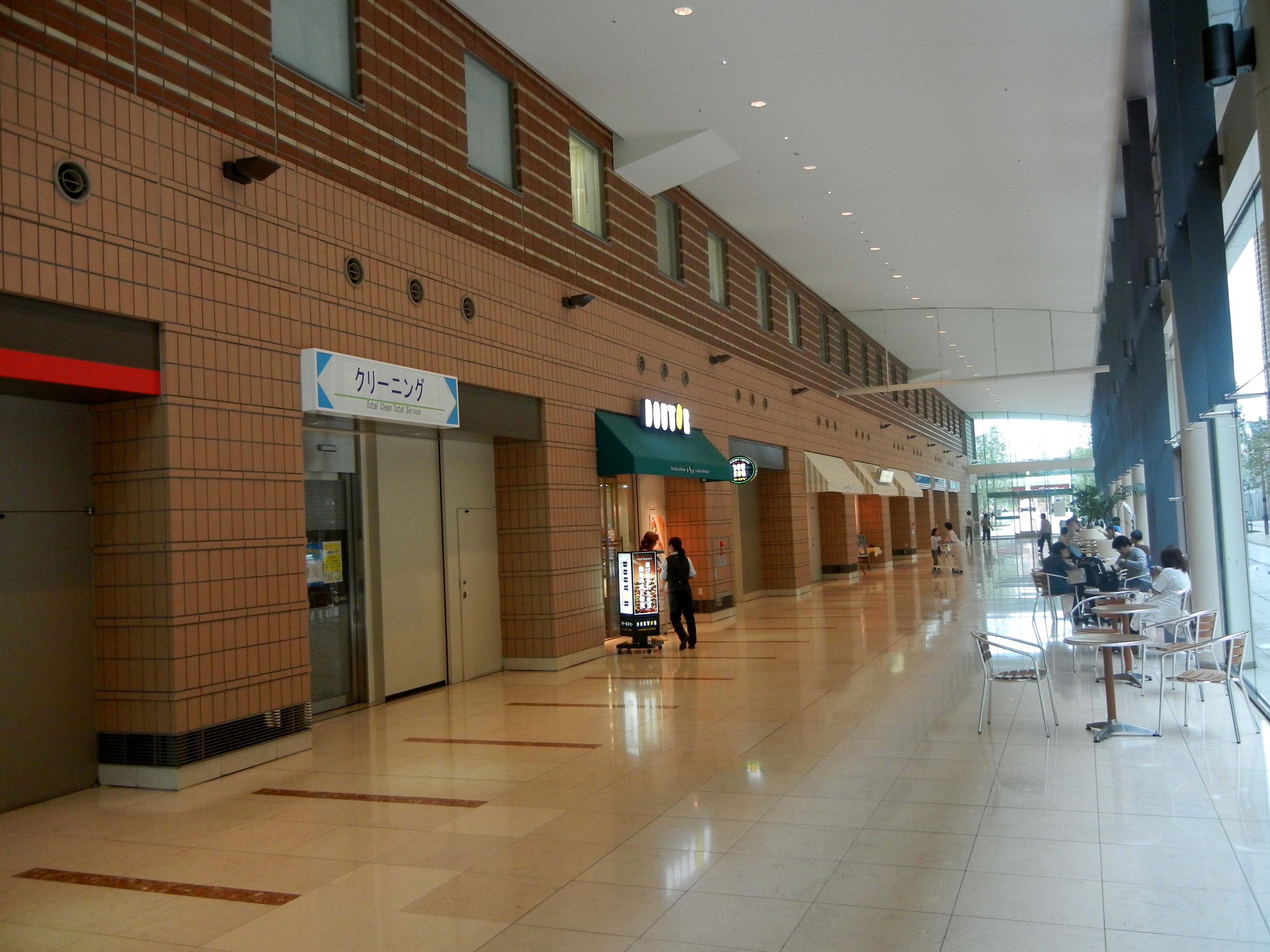 帝京大学板橋キャンパス 医学部附属病院1F